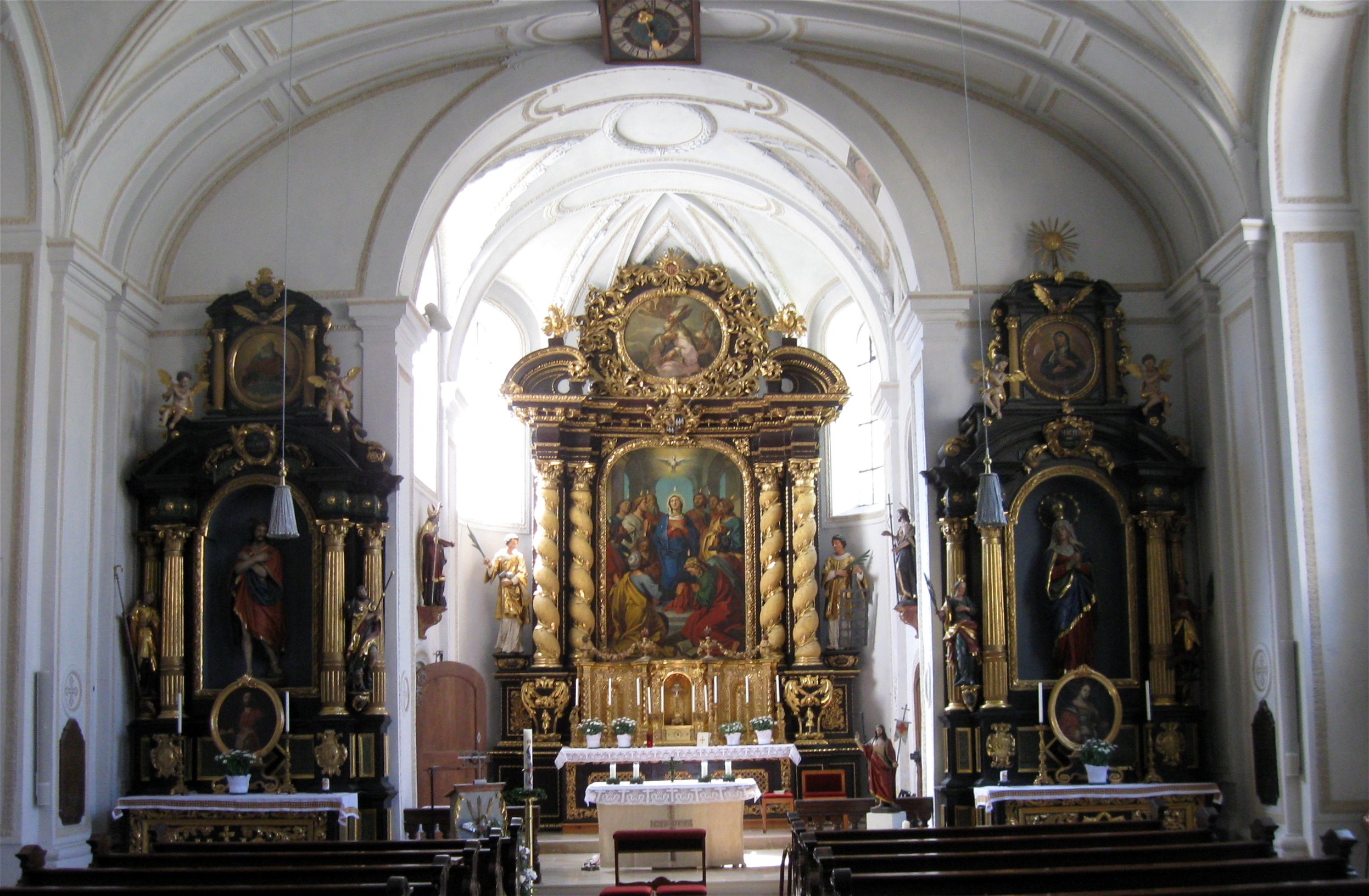 Heiliggeistgasse 5; Hl.-Geist-Spital, einheitlicher Vierflügelbau mit drei Geschossen und kräftiger barocker Putzgliederung, im Torweg Schlußstein des 14. Jh., wohl von Antonio Riva 1686-88; nach Süden gerichtete Spitalkirche, Saalbau mit stark eingezogener Apsis, Pilastergliederung und Haubenturm, 1697; mit Ausstattung. Innenraum